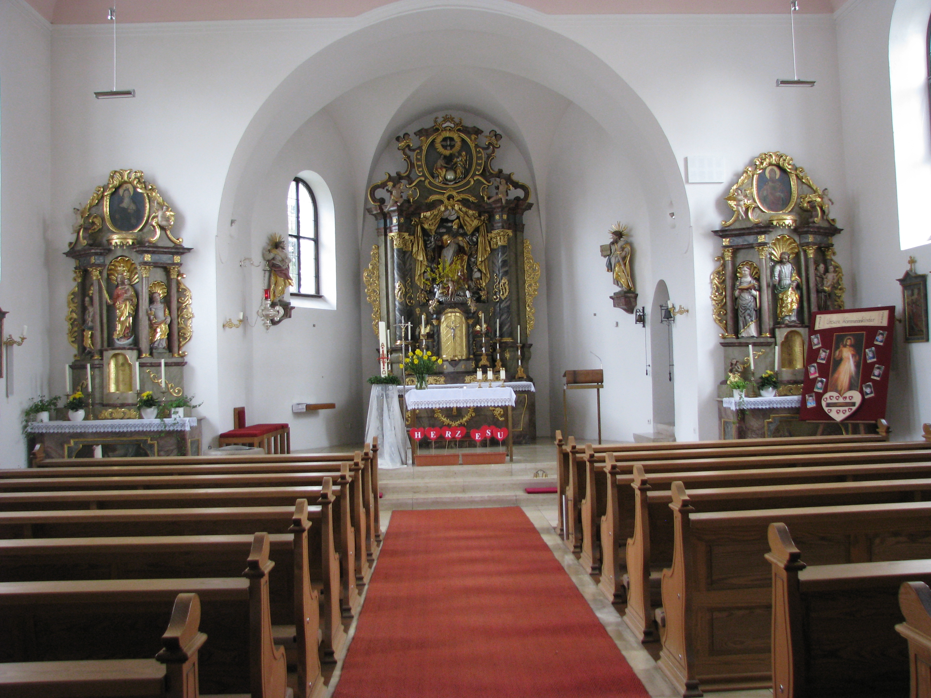 Mörsdorf, Ortsteil von Freystadt im Landkreis Neumarkt in der Oberpfalz, Bayern, Pfarrkirche St. Blasius, Inneres